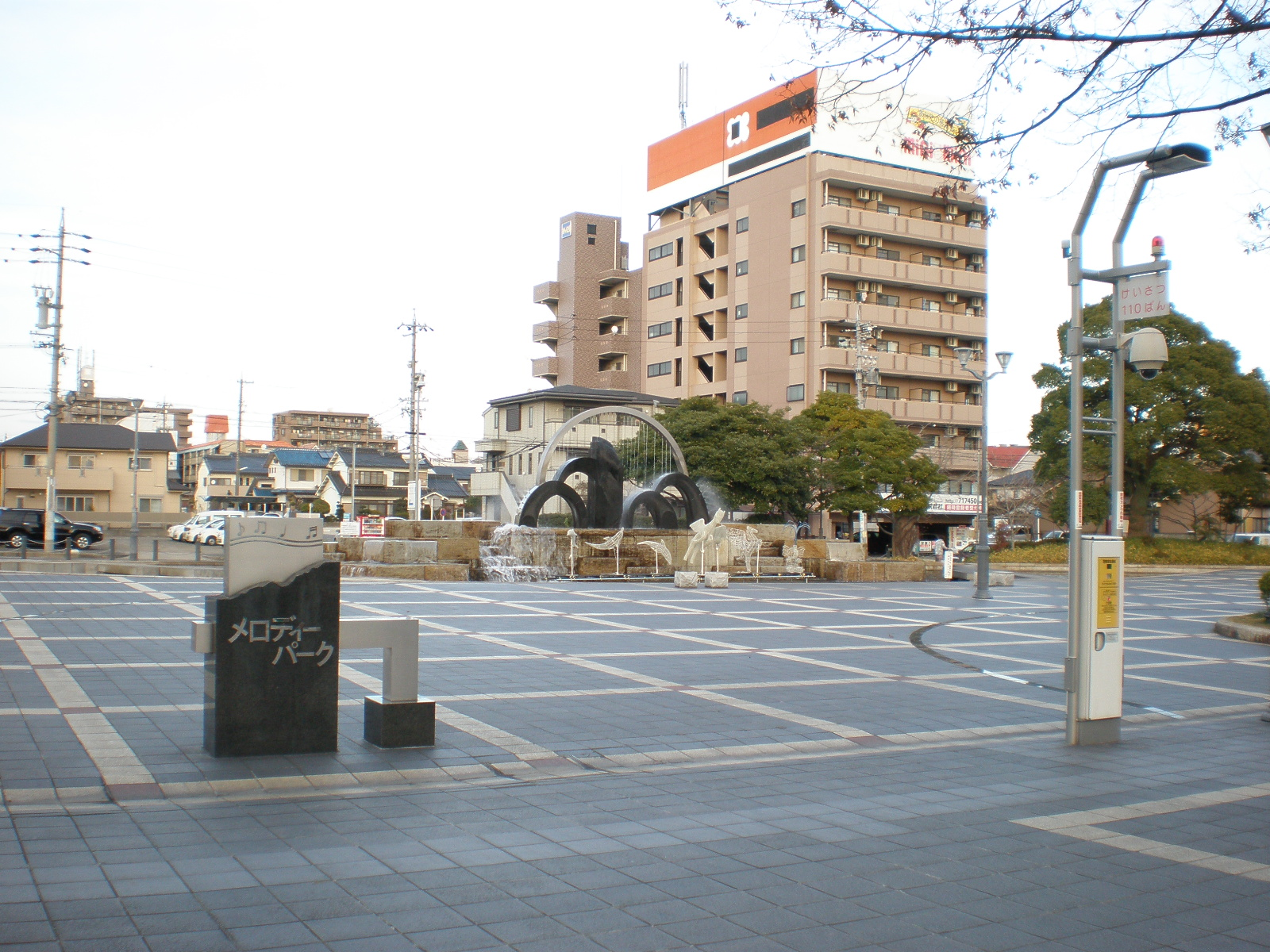 愛知県小牧市にあるメロディーパーク